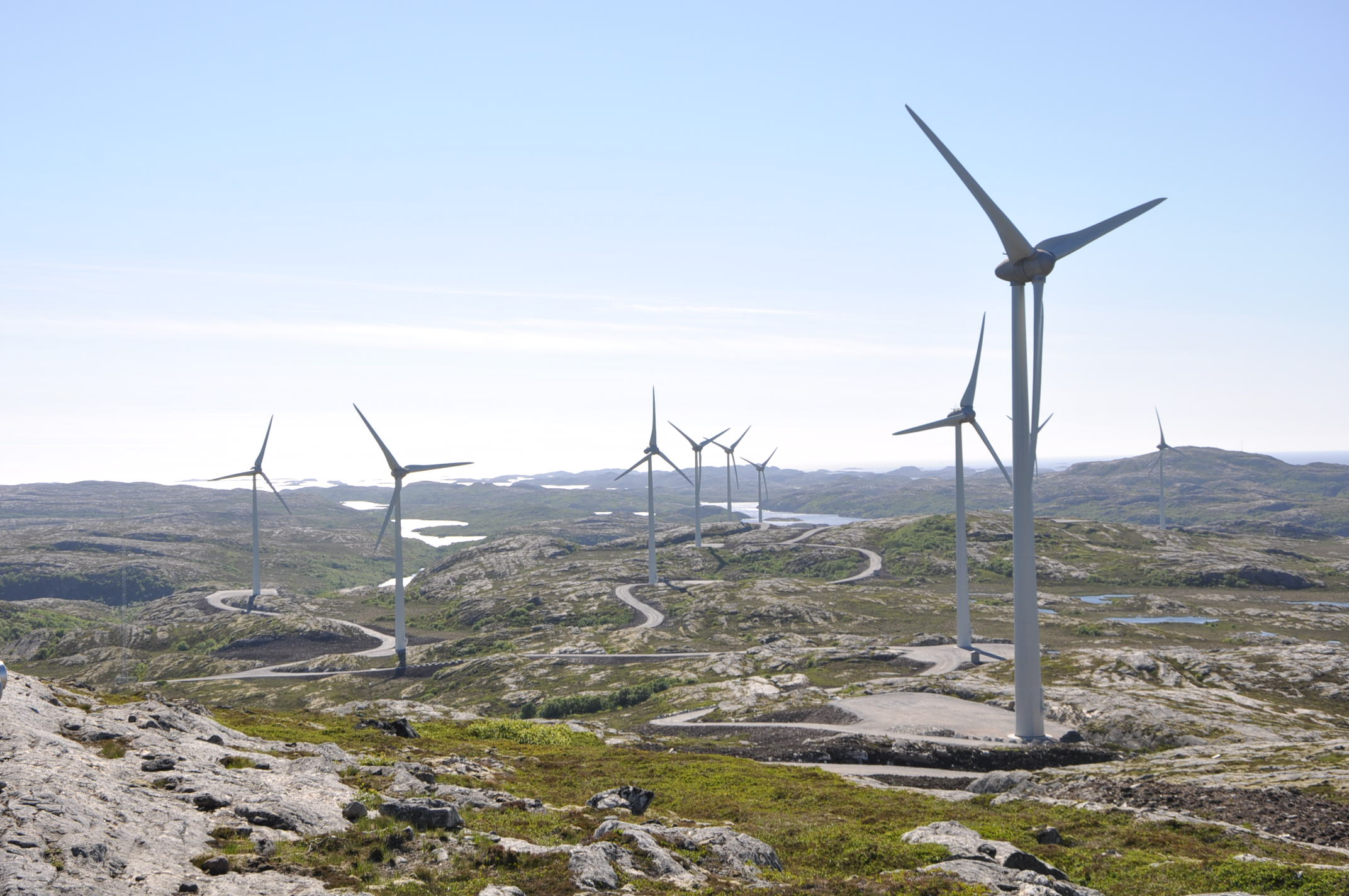 Ytre Vikna Vindmøllepark